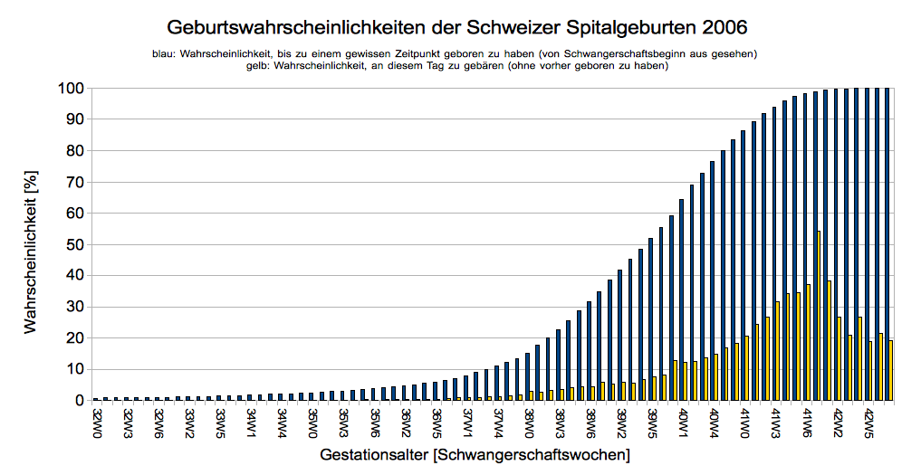 Wahrscheinlichkeit, bis zu einem gewissen Zeitpunkt geboren zu haben (blau), bzw. Wahrscheinlichkeit, an einem gewissen Zeitpunkt zu gebären, wenn man zu diesem Termin noch schwanger ist.